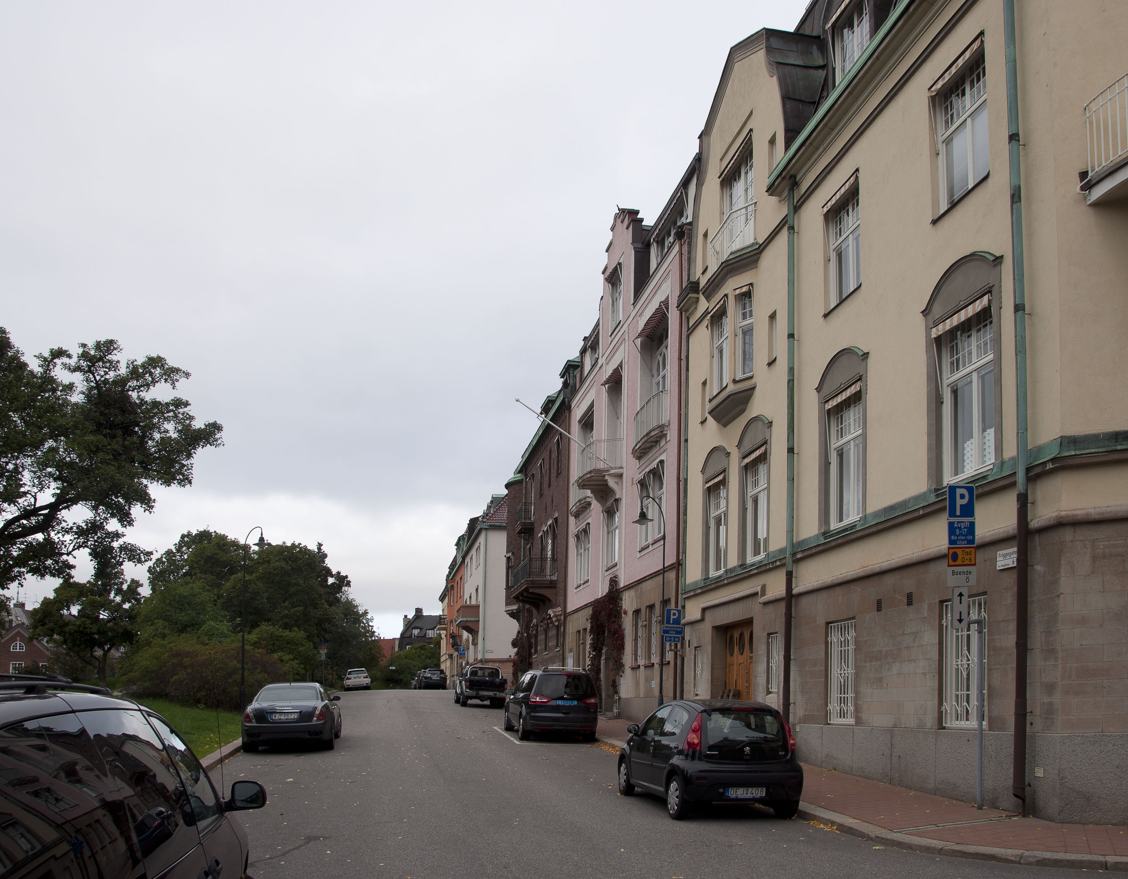 Friggagatan, Stockholm